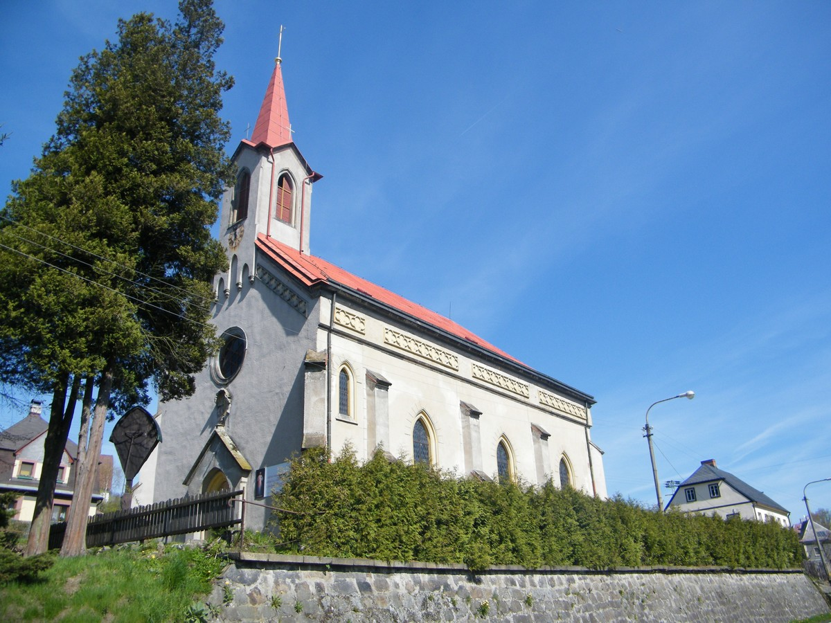 Kostel svatého Michaela archanděla v Dolní Poustevně